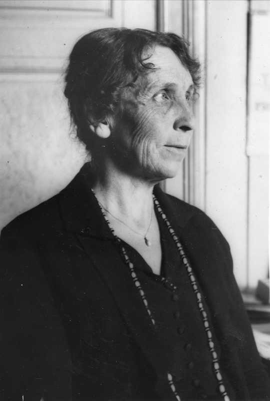 Ragna Hørbye f. Heyerdahl var politiker for Frisinnede Venstre. Hun utga også to novellesamlinger.